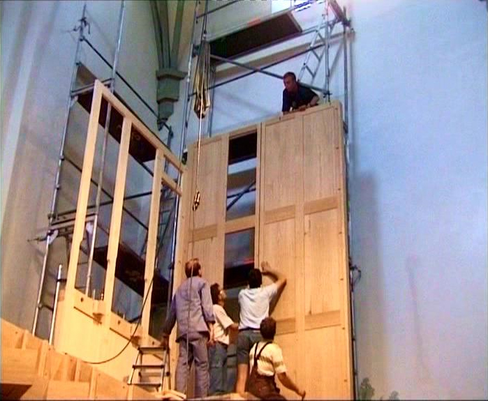 Montage der Gehäuseteile der großen Goll-Orgel in St. Martin zu Memmingen.